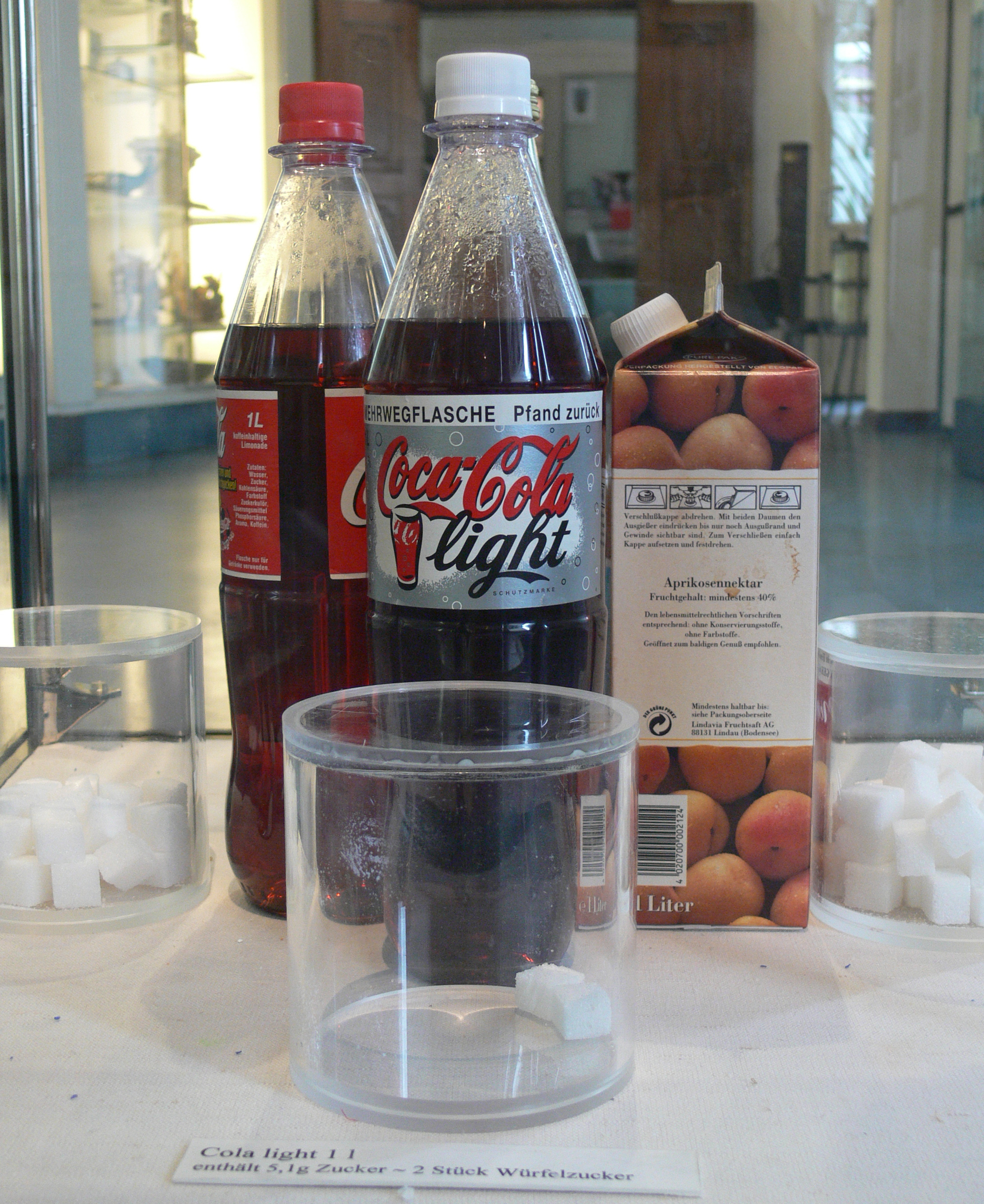 Zucker-Museum Berlin; anschaulicher Vergleich des Zuckergehalts in Lebensmitteln mit der entsprechenden Menge Zuckerwürfel, Coca-Cola light, 1 Liter enthält 5,1 g Zucker ~ 2 Stück Würfelzucker